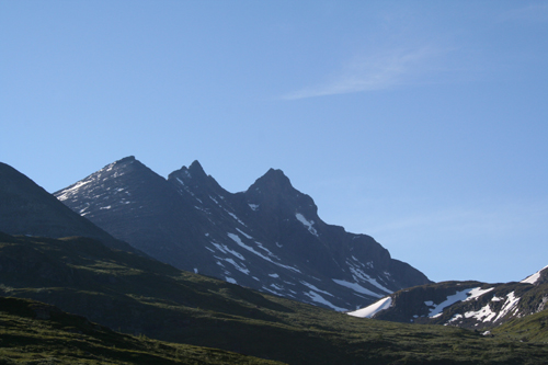 Hurrungane mountains in Jotunheimen, Norway